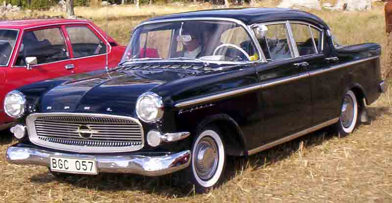 Opel Kapitan P 4-Door Sedan 1959